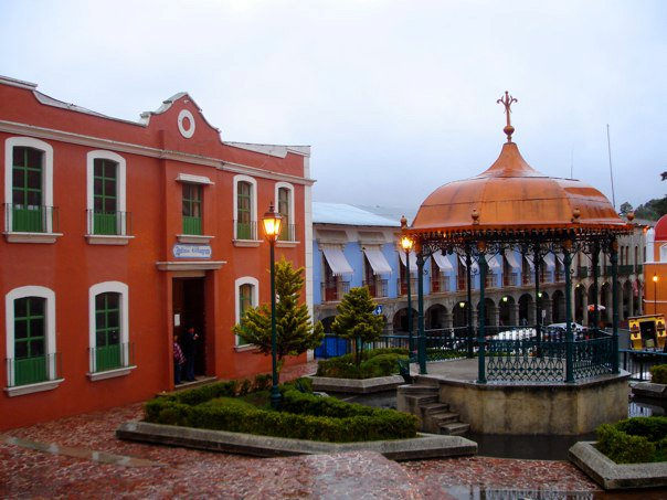 Real del Monte, México